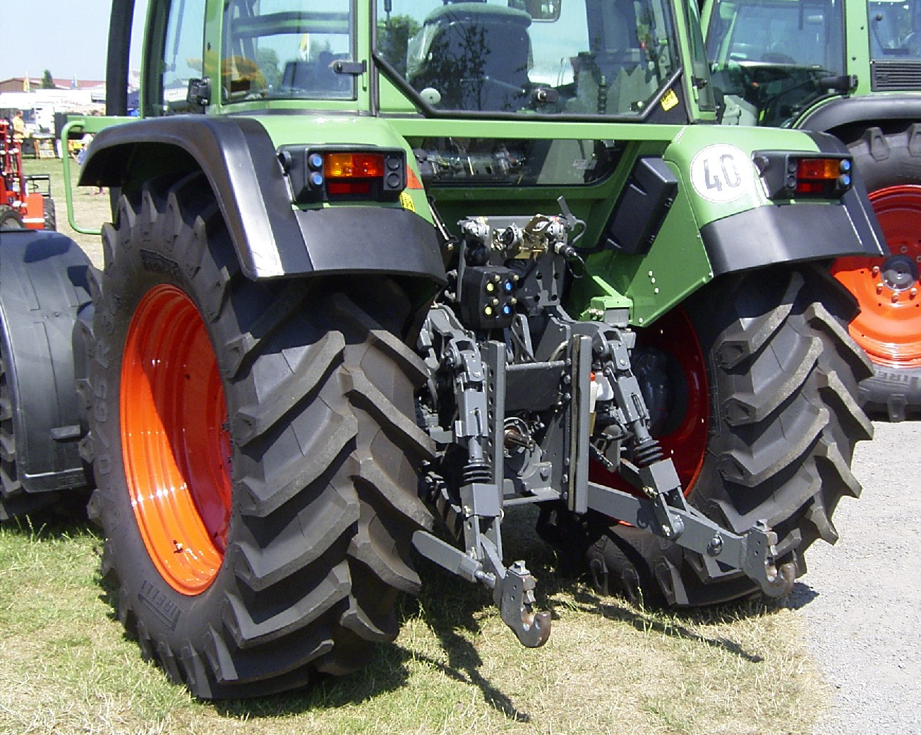 Rückseite eines Fendt-Traktors. Sichtbar sind die Unterlenker der Dreipunkthydraulik, die Zapfwelle des Nebenantriebs, sowie darüber die vielfachen Anschlüsse für Strom und Hydraulikschläuche.